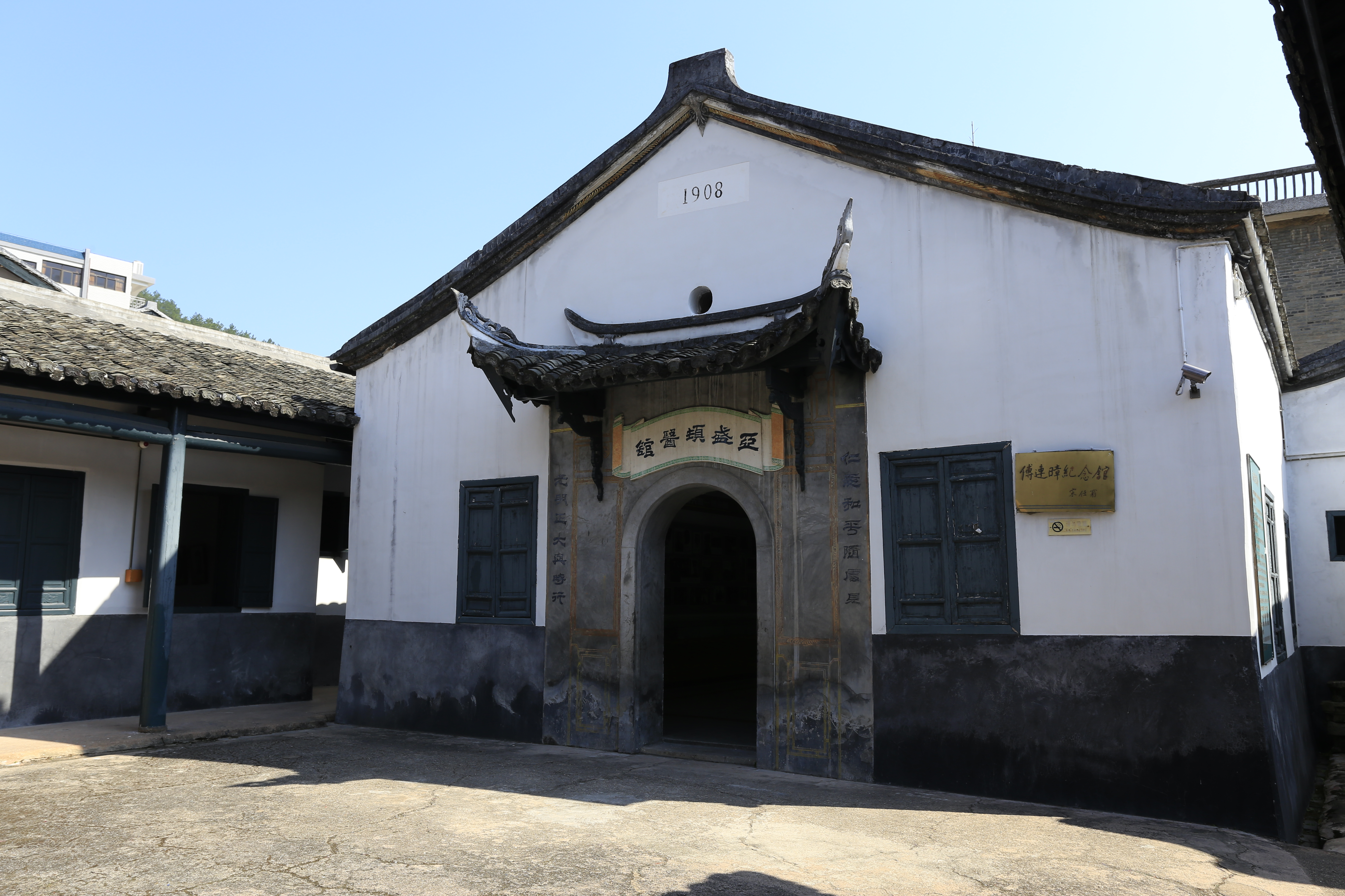 福建省长汀县中央红色医院（原福音医院）旧址—— 亚盛顿医馆（傅连璋纪念馆）